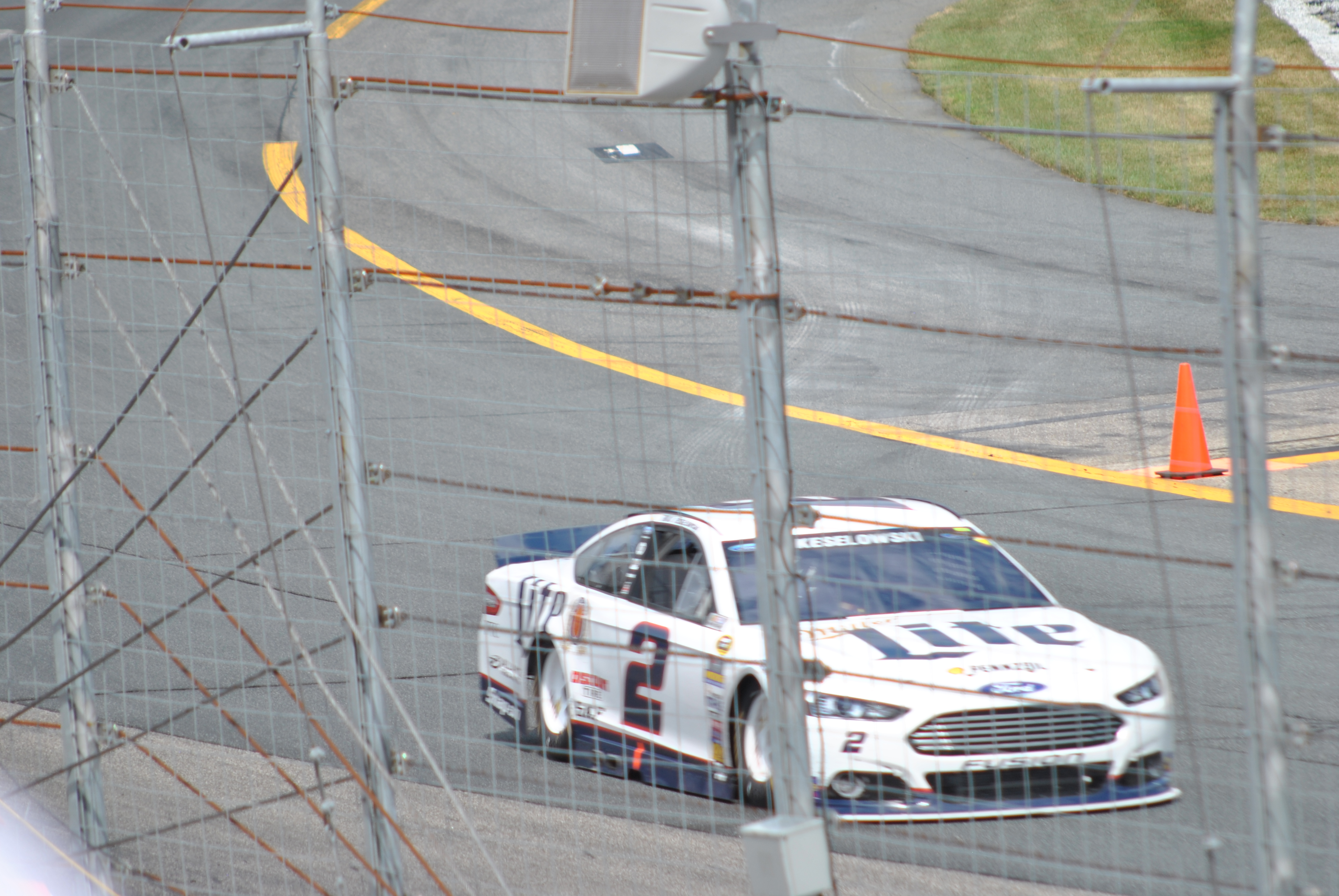 Brad Keslowski